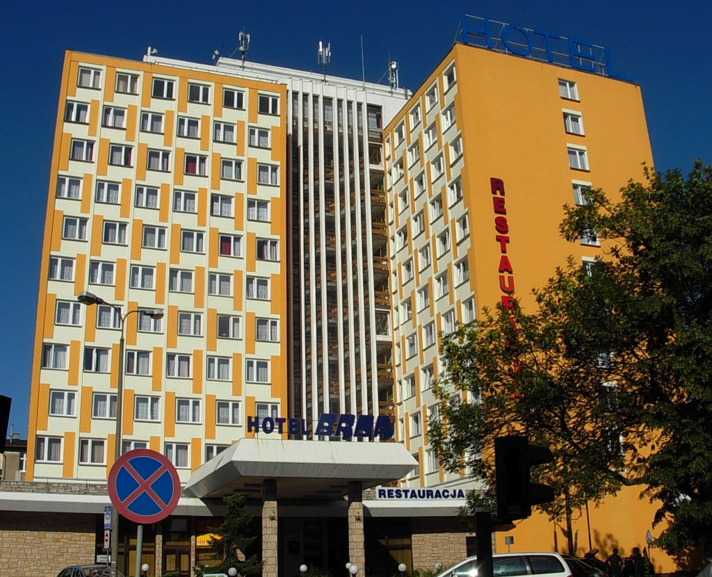 Hotel "Brda" ul. Dworcowa 94 w Bydgoszczy